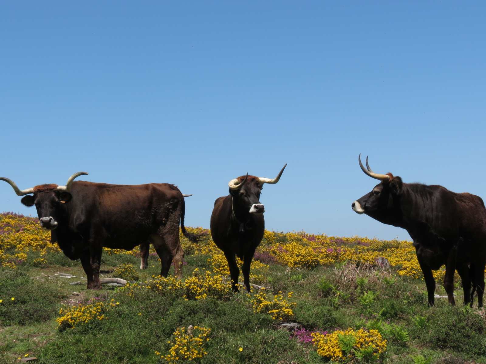 A vaca maronesa é caraterística do Alvão. This is a photography of a Site of Community Importance in Portugal with the ID: PTCON0003. Natura2000 entry, EEA entry